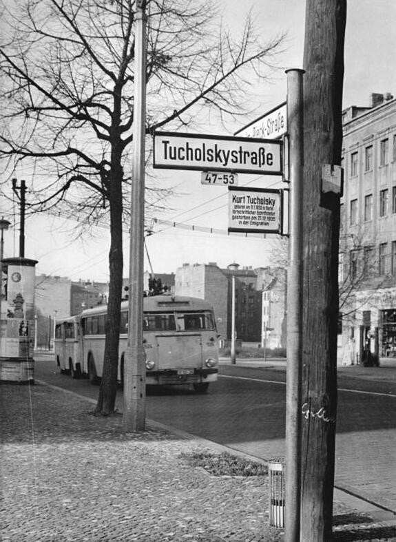 Berlin, Straßenschild Kurt-Tucholsky-Straße Zentralbild Zühlsdorf 4.11.1960 Straßenschild mit Geburts- und Sterbedatum von Kurt Tucholsky.